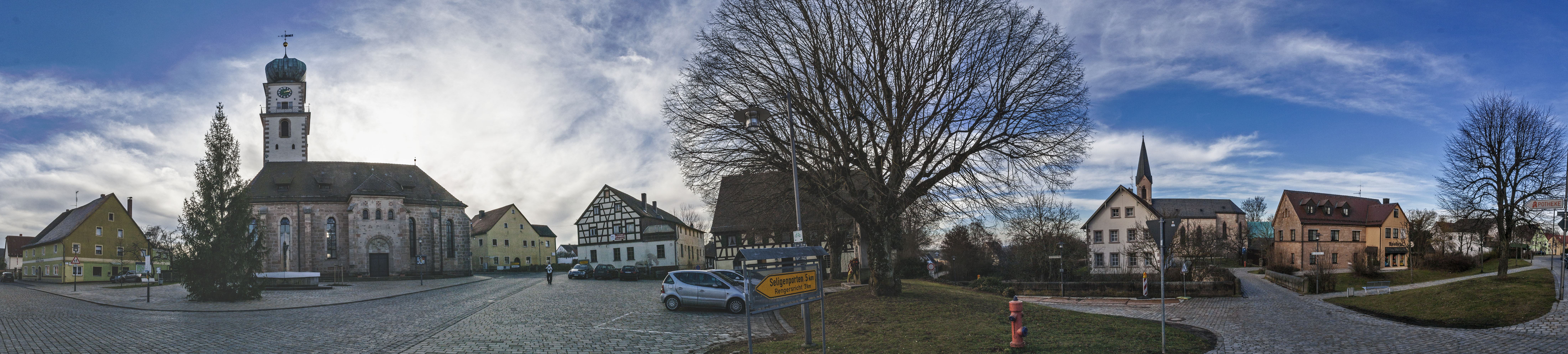 Pyrbaum, Marktplatz, Panorama